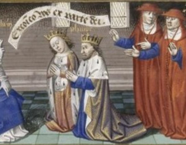 Bertrada z Montfortu a Filip I. - exkomunikace